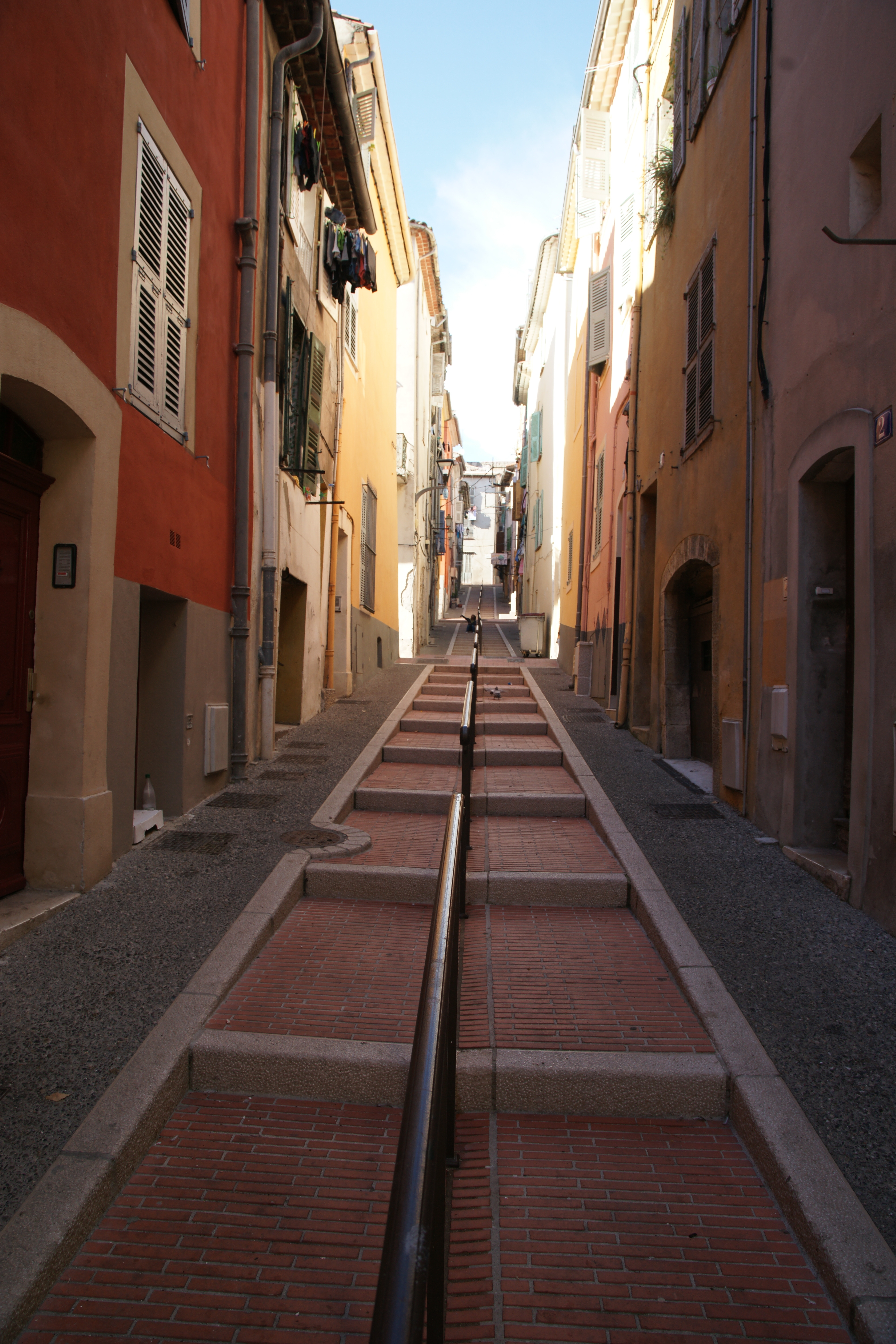 rue Lascaris, Vallauris, France